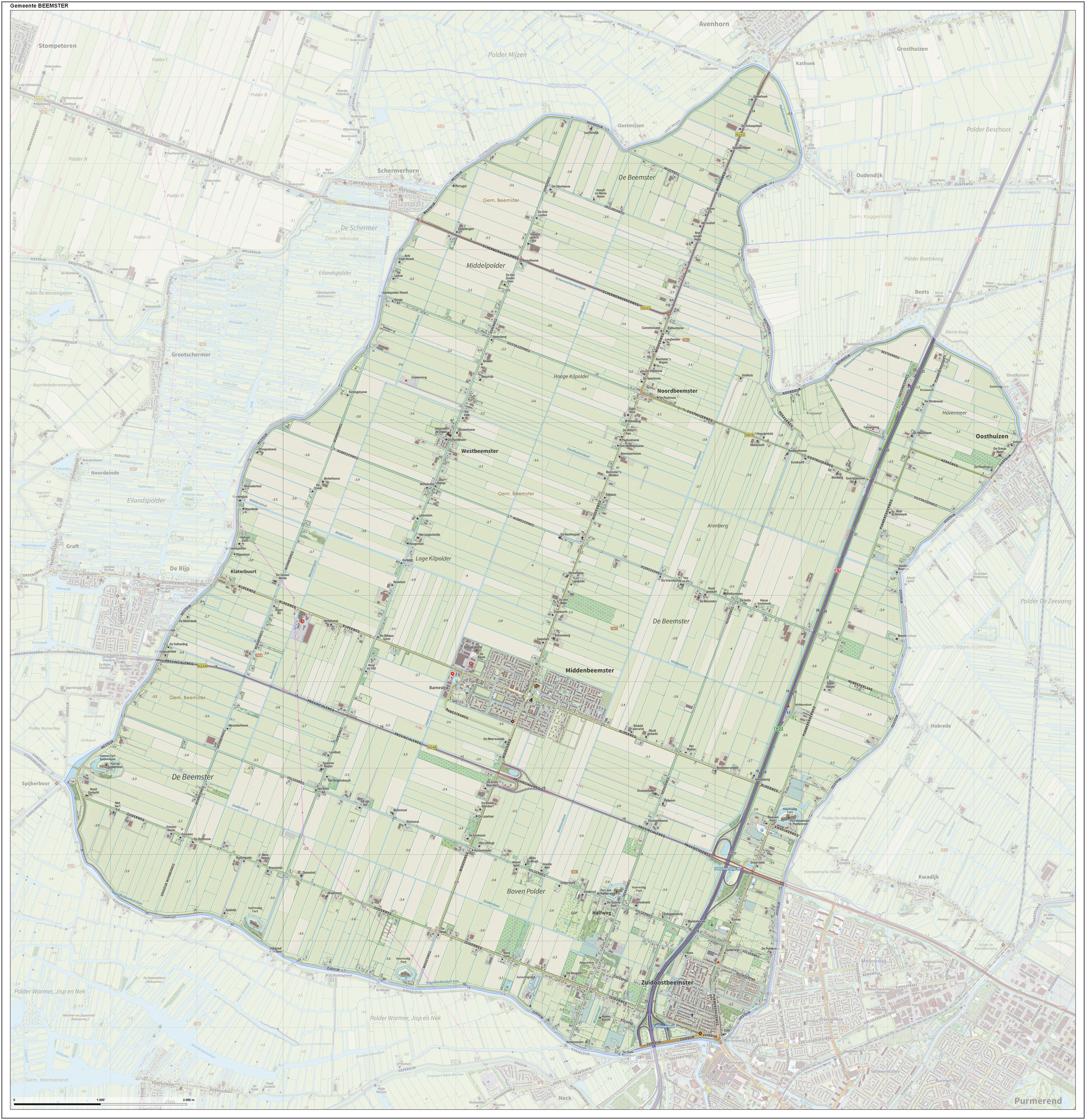 Topografische gemeentekaart. Resolutie: 400 pixels/km. Kaartbeeld samengesteld uit de open geodata van de Top10NL en Top25namen (Kadaster), Creative Commons-BY licentie. Gebouwvlakken uit open geodata BAG extract. Wegen uit de OpenStreetMap, OpenStreetMap community. Reliëfschaduw uit de Actuele Hoogtekaart AHN2. Samenstelling en kleurenschema: Jan-Willem van Aalst, met QGIS. Zie ook de Legenda.